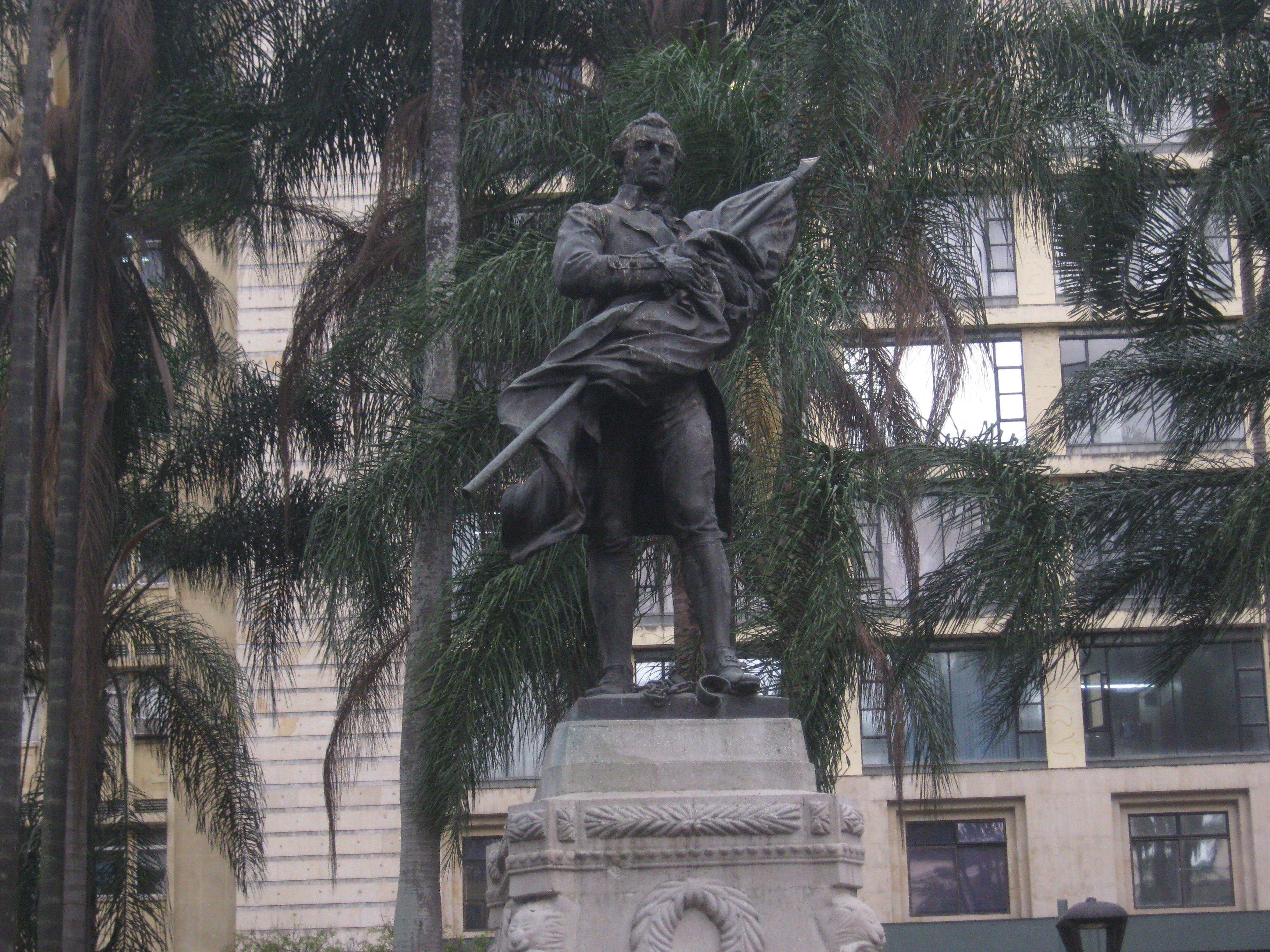 Estatua de Joaquín de Caycedo y Cuero en la plaza que lleva su apellido.